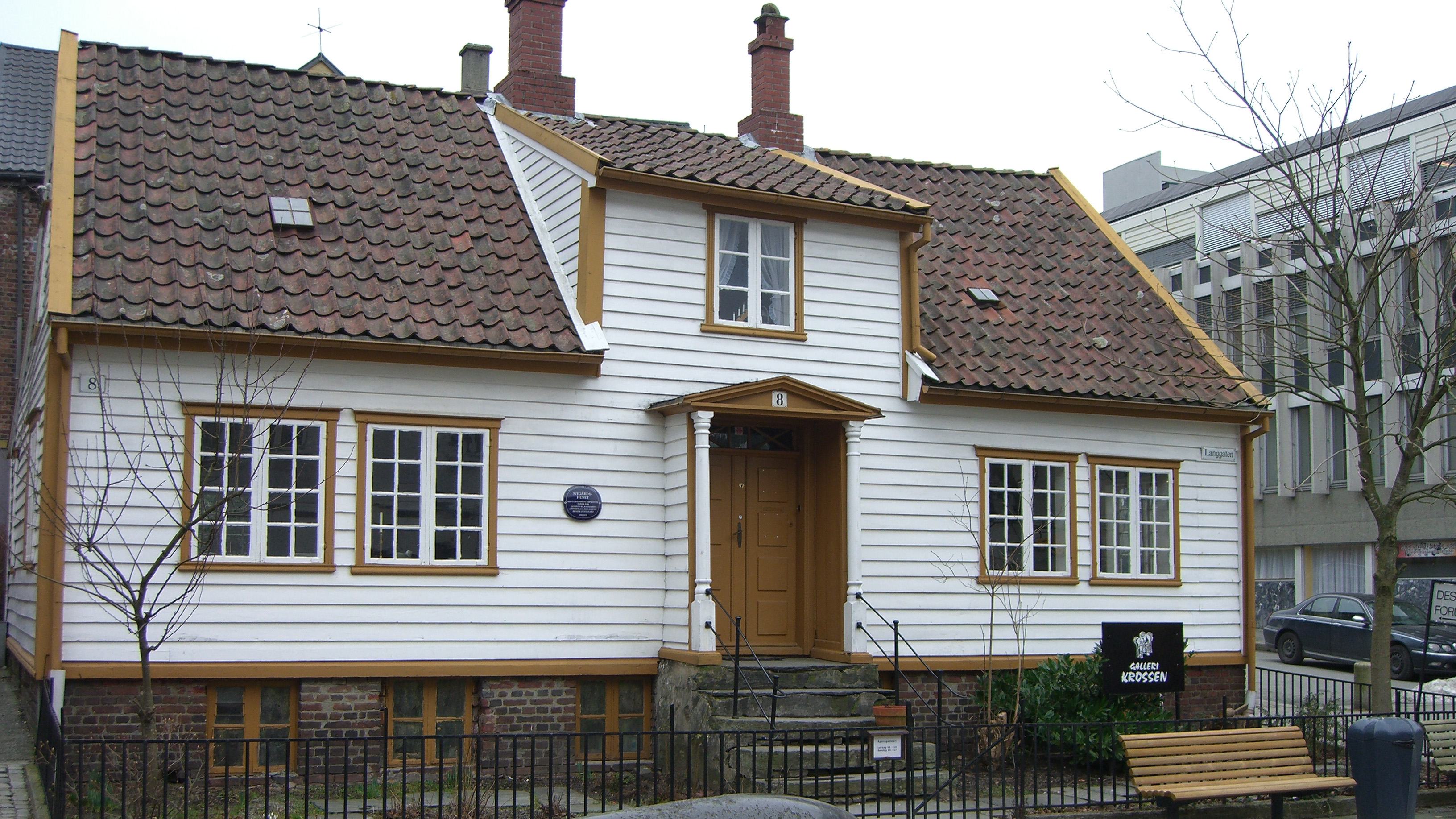 Langgata 8 in Sandnes, Norway